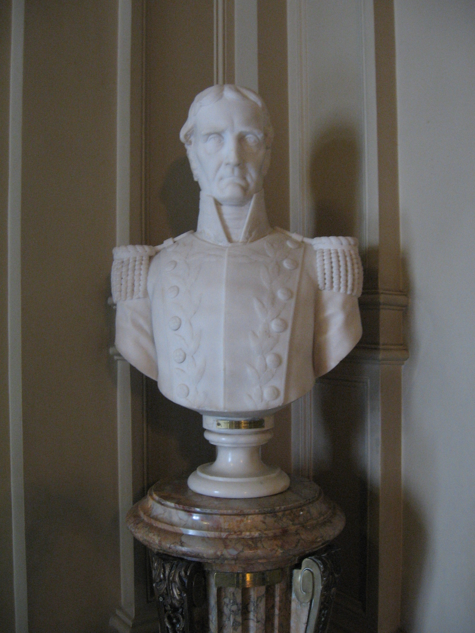 Busto de Cornelio Saavedra en el Salón de los Bustos de la Casa Rosada